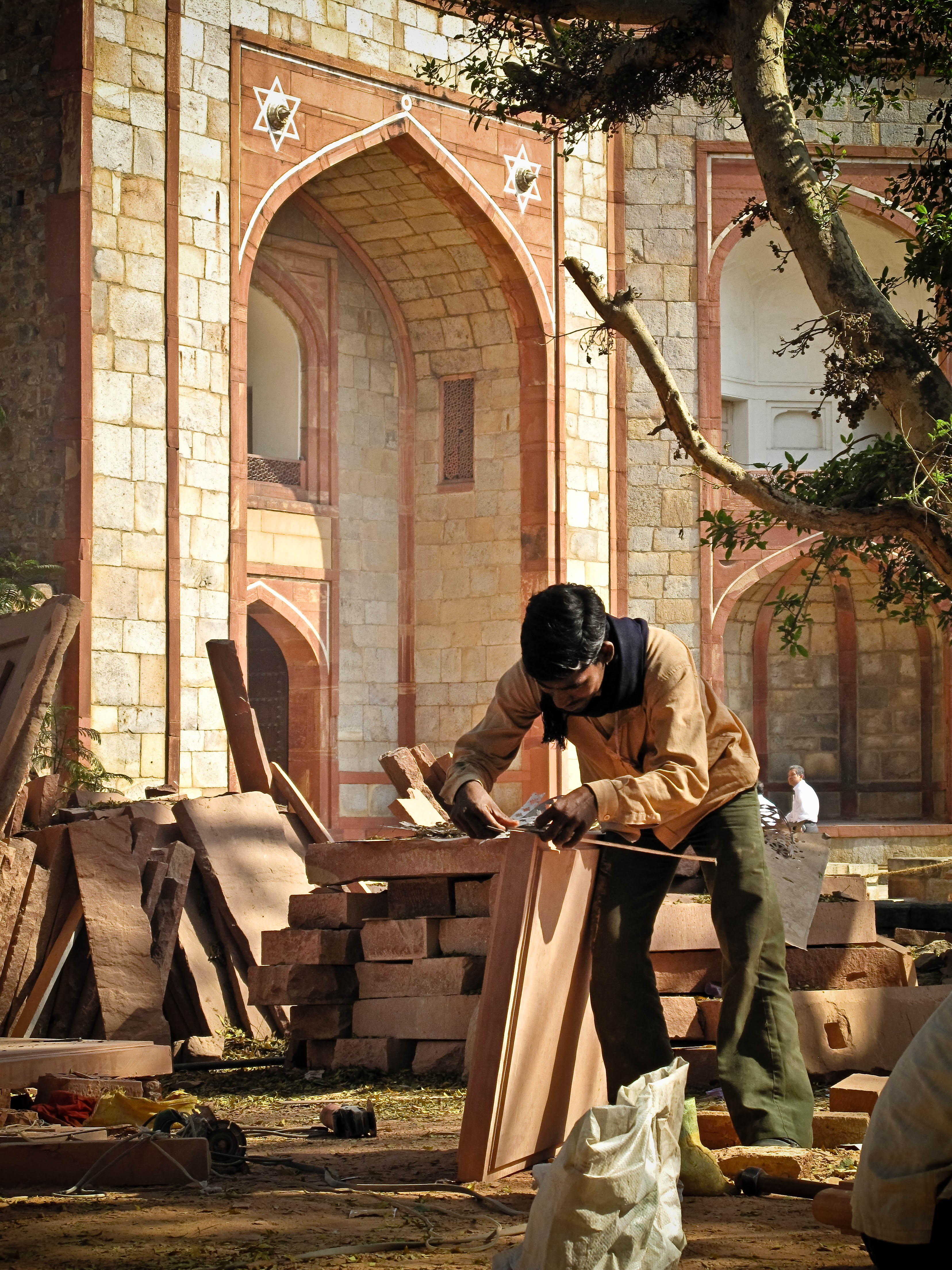 Trabajo de restauraci�n [ HUMAYUN'S TOMB ] Marzo 2010